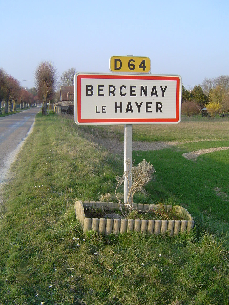 Bercenay-le-Hayer - panneau à l'entrée du village